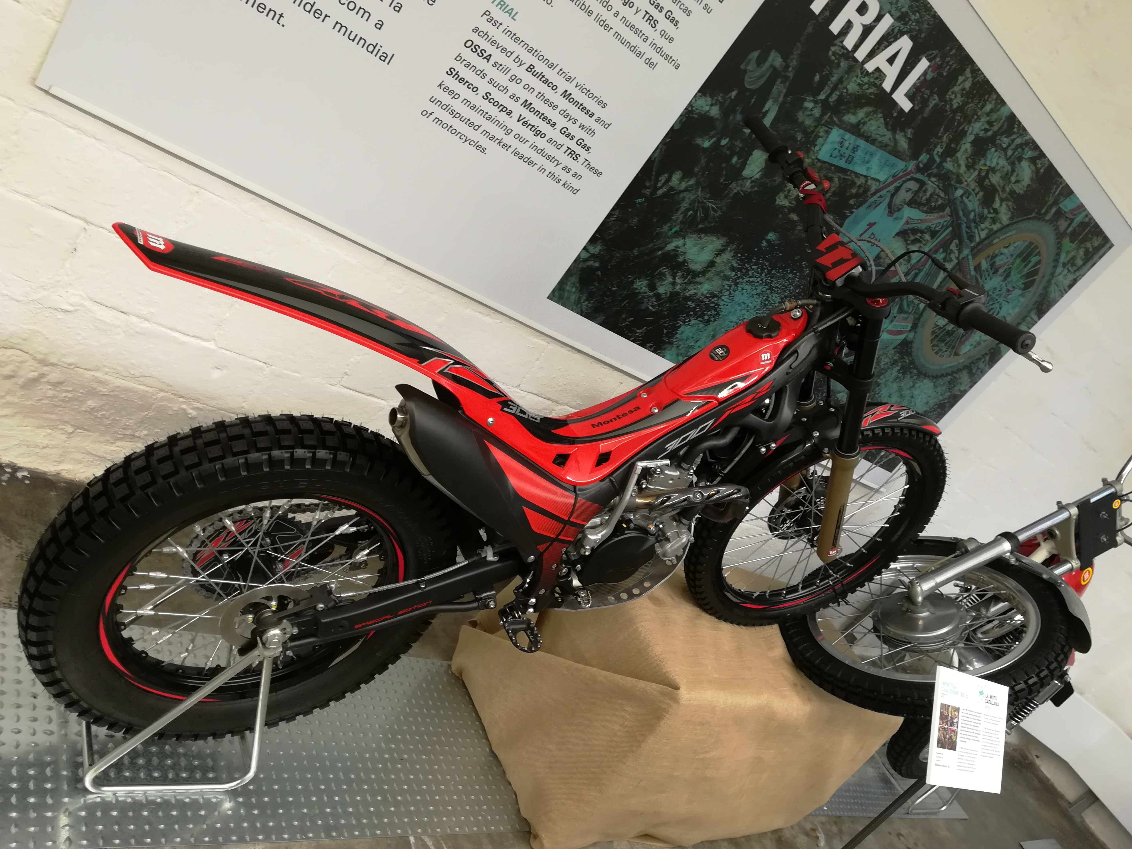 Montesa Cota 300RR, 300cc (2017)